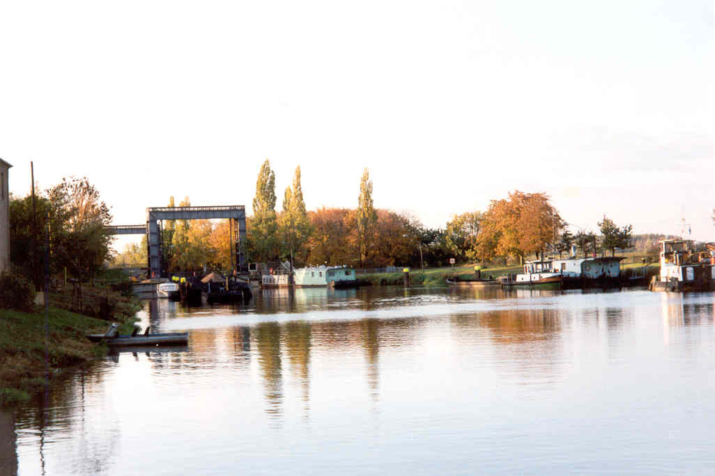 Schleuse von Mukrena (eigene Arbeit)